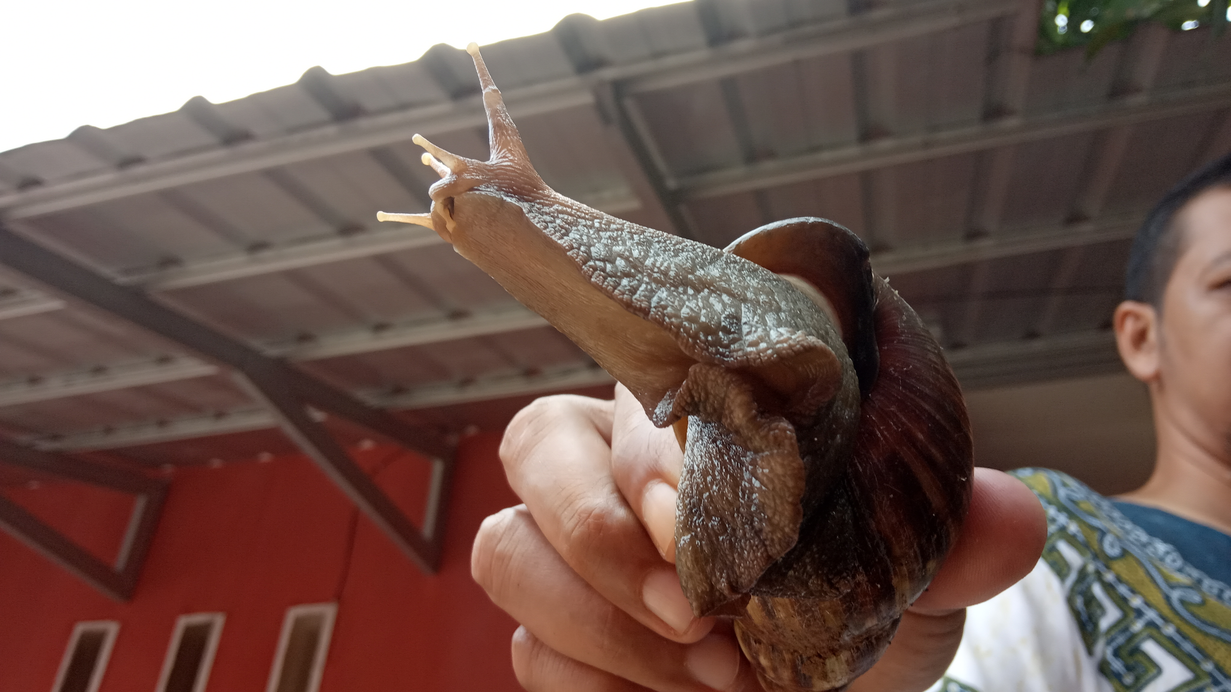 Bekicot